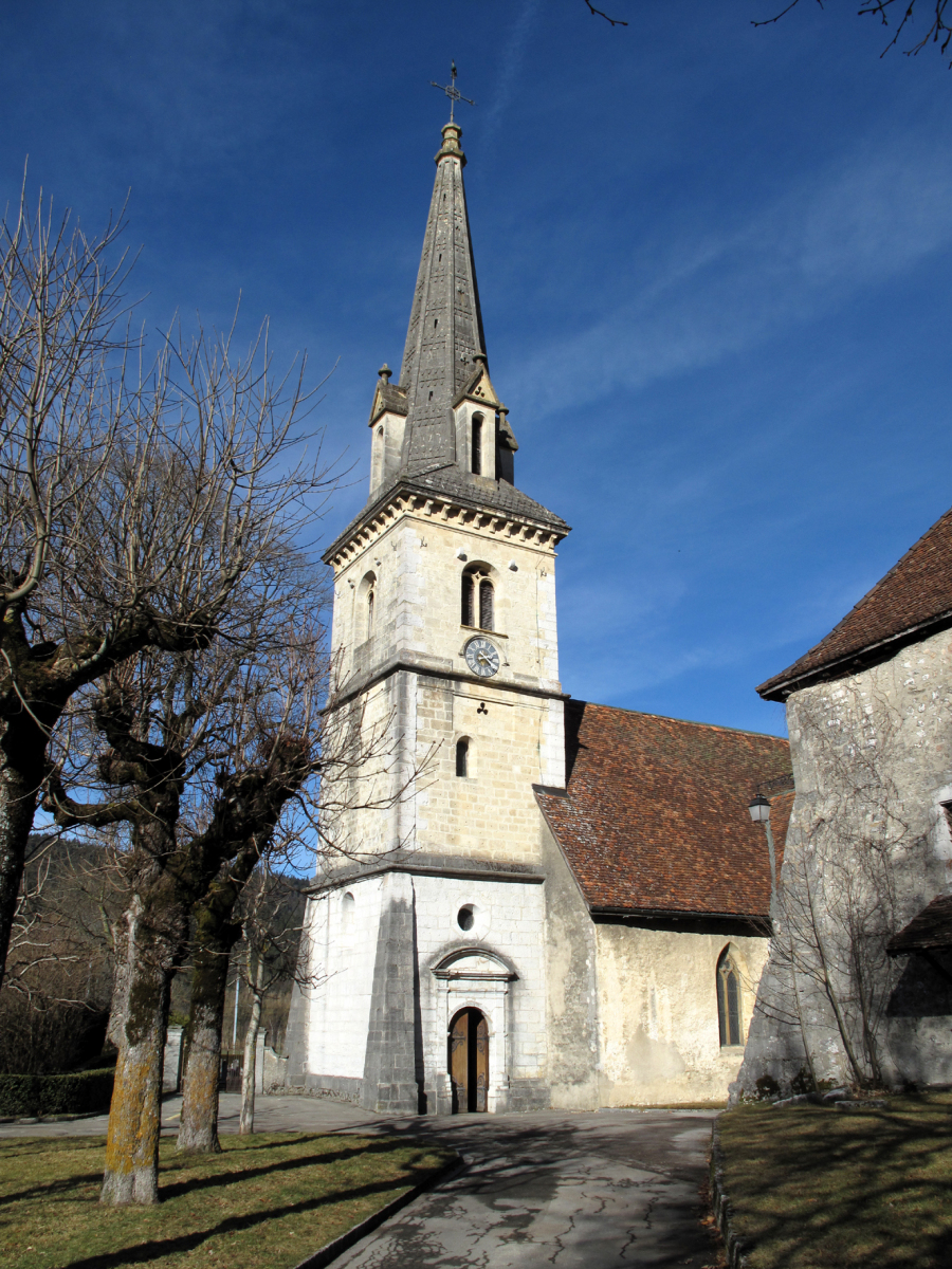 Môtiers, temple